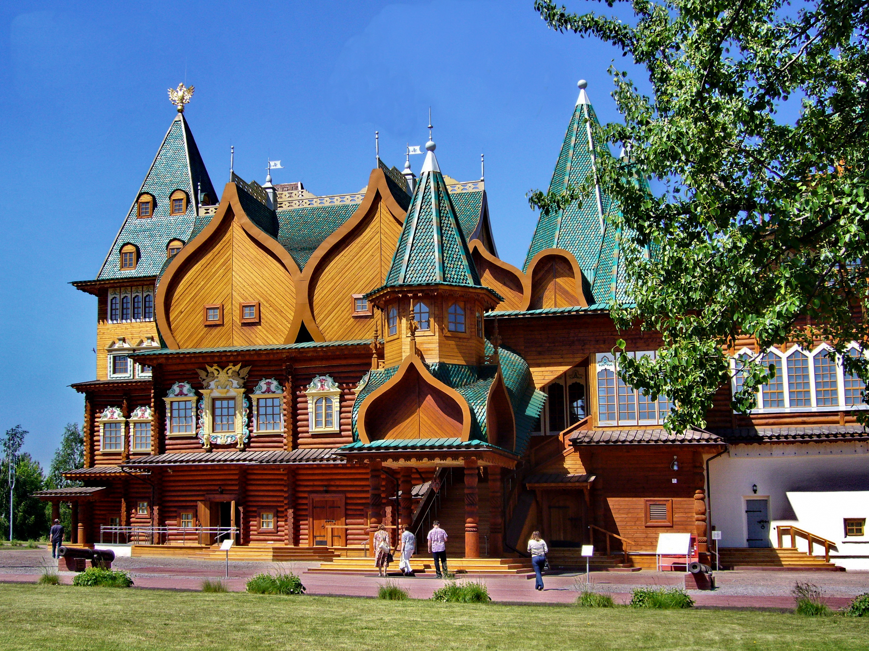 Царский дворец